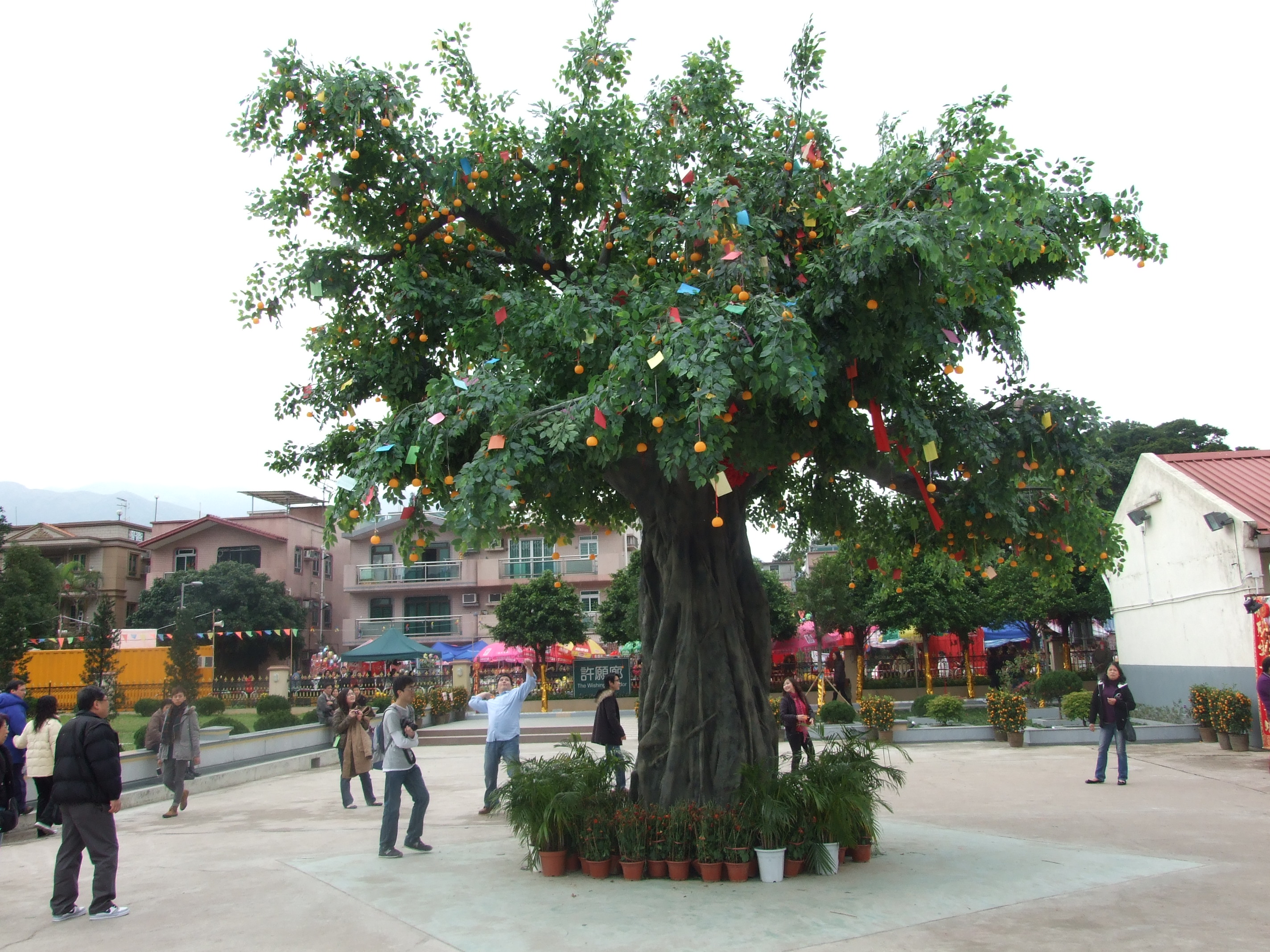 中文（香港）: 2010年25呎塑膠許願樹